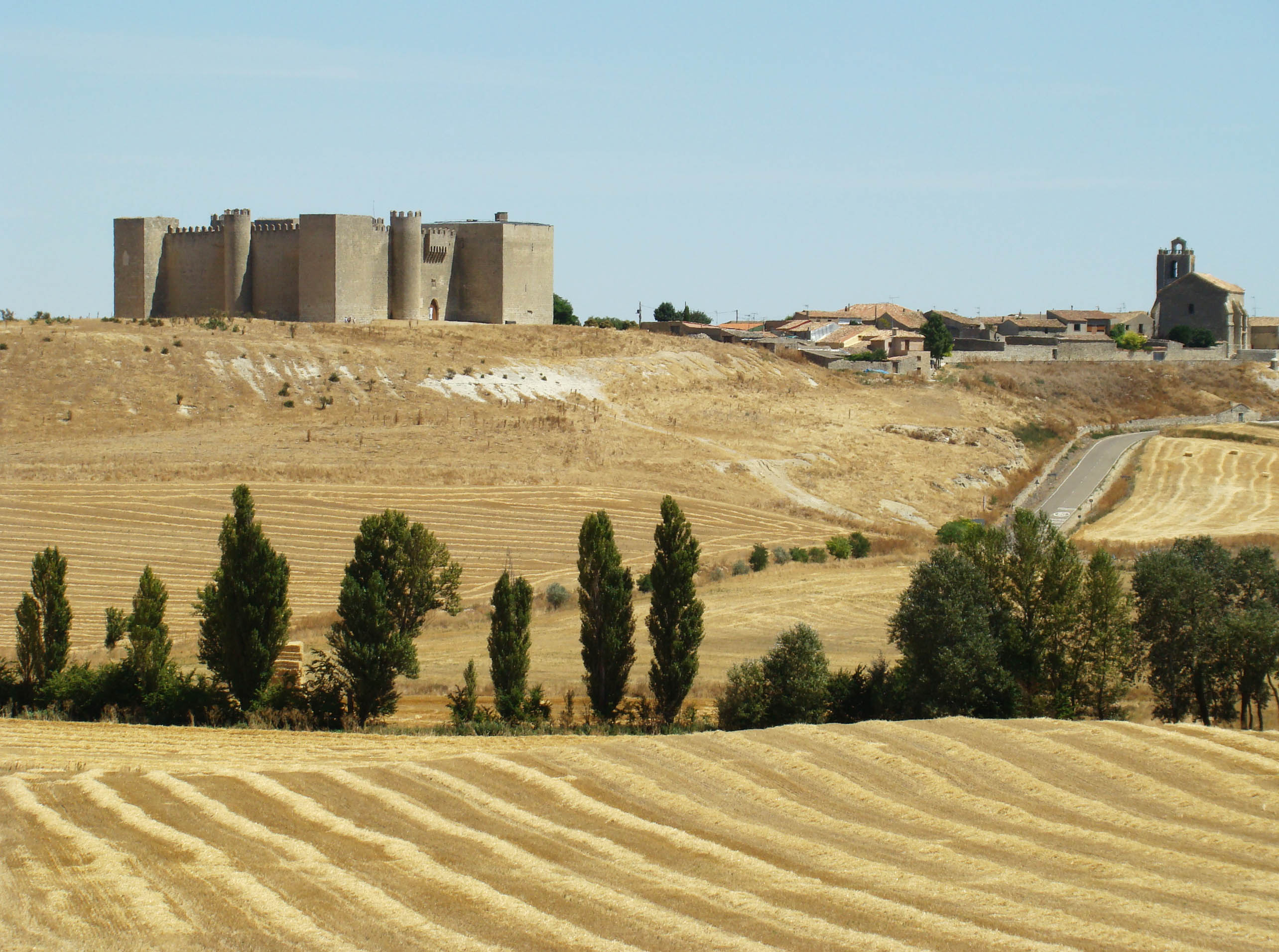 A lo lejos el castillo de Montealegre, localidad de Valladolid (España). Conocido también como castillo de los Alburquerque. Fue construido a finales del siglo XIII o principios del XIV por Alfonso de Meneses. Durante muchos años del siglo XX perteneció al Ministerio de Agricultura y fue usado como silo. Tras la restauración en los últimos años del siglo XX se convirtió en el Centro de Interpretación de la Edad Media instalado por la Fundación del Patrimonio Histórico.